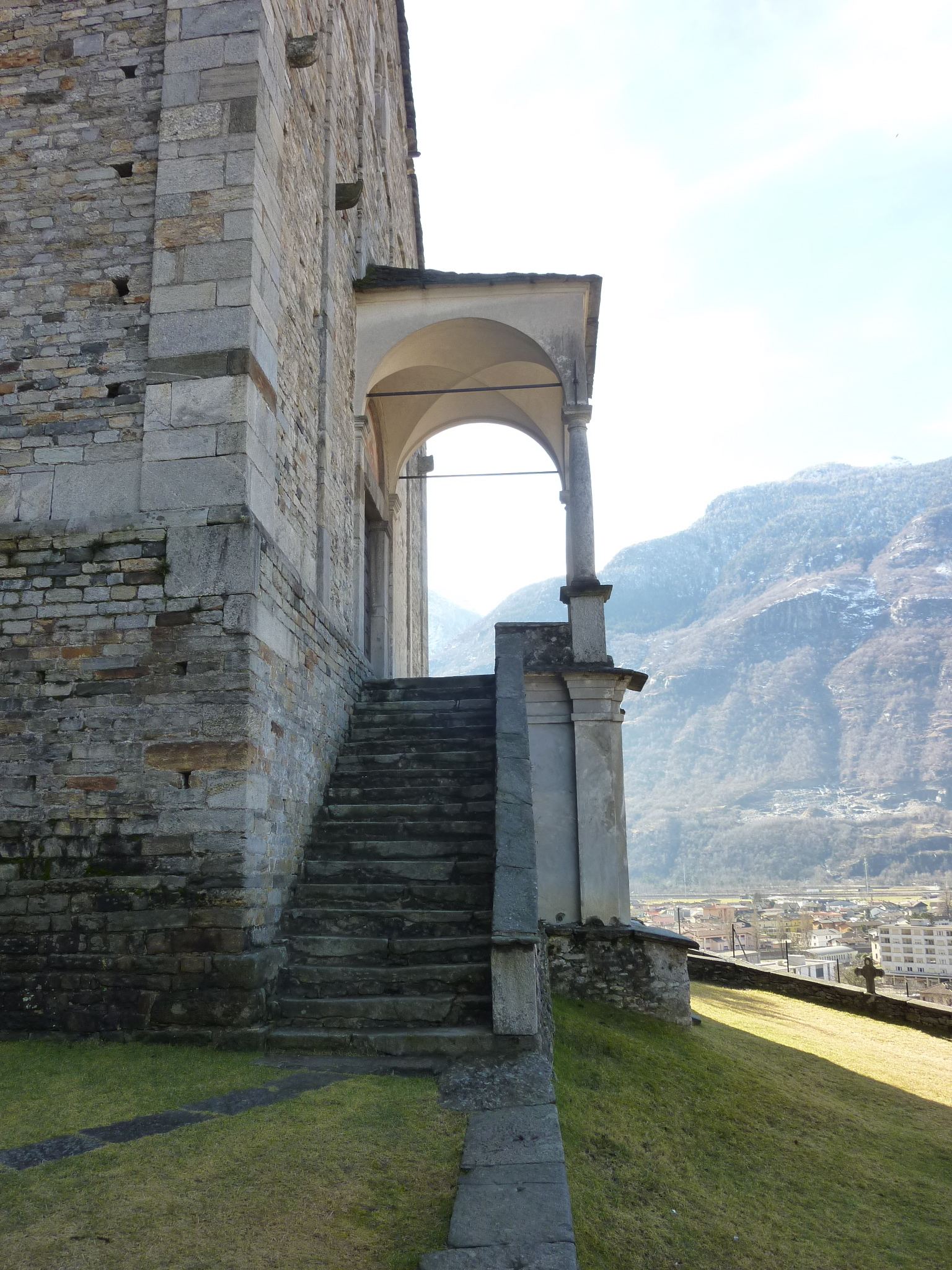 Kirche San Pietro e Paolo (Biasca) unterer Eingang von der Seite